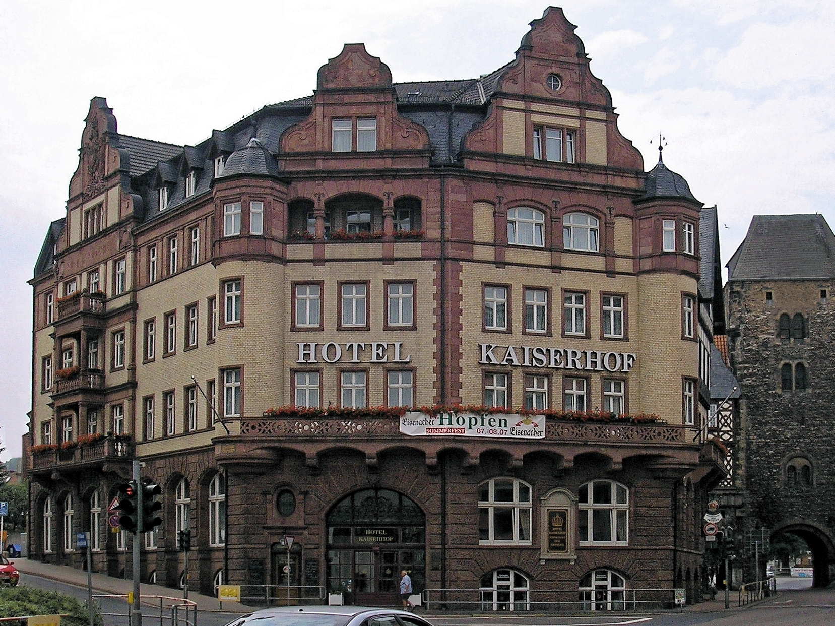 Hotel Kaiserhof in Eisenach (Thüringen).